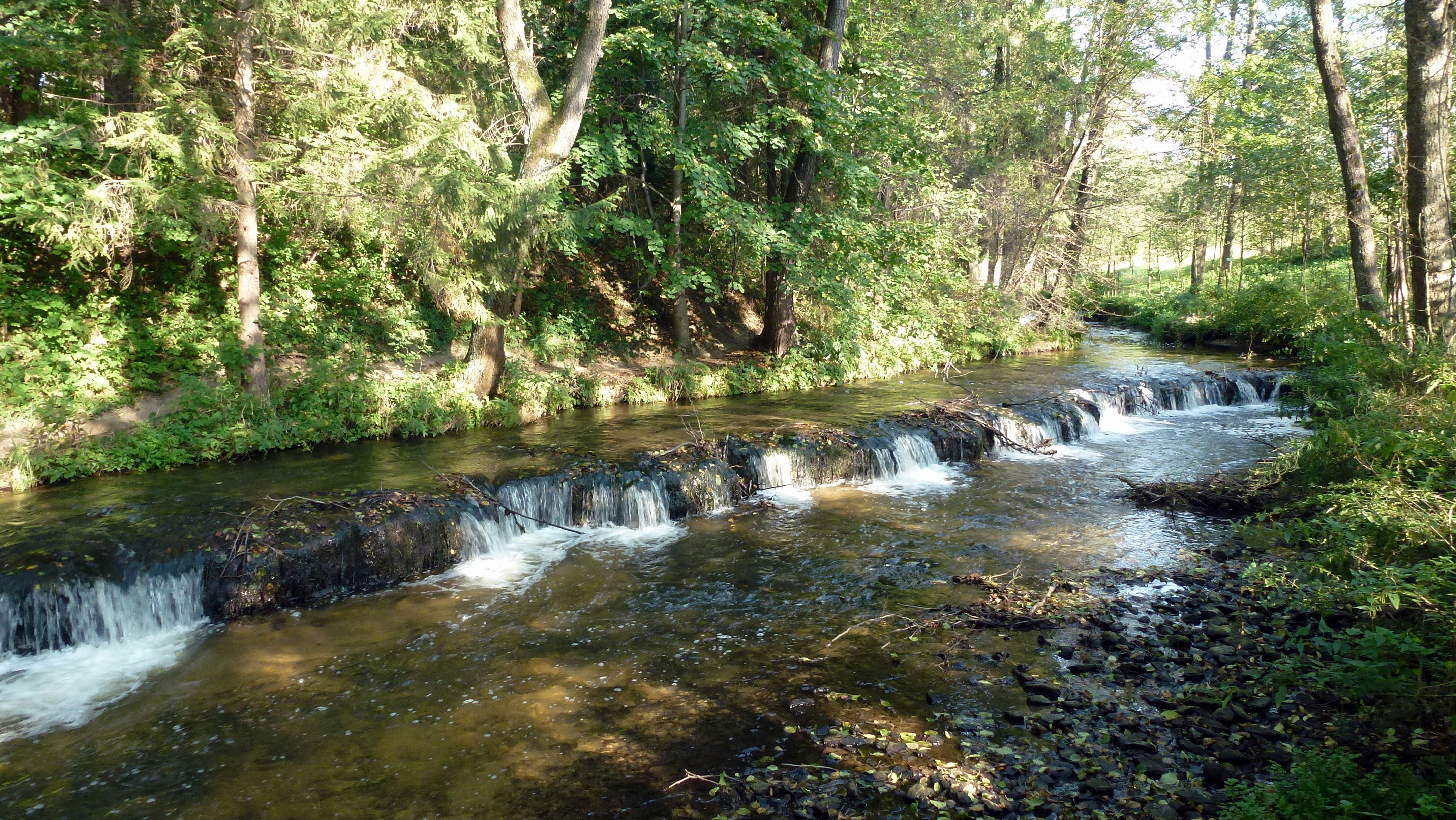 Szumy w rezerwacie "Nad Tanwią"